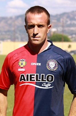 Stefano Fanucci